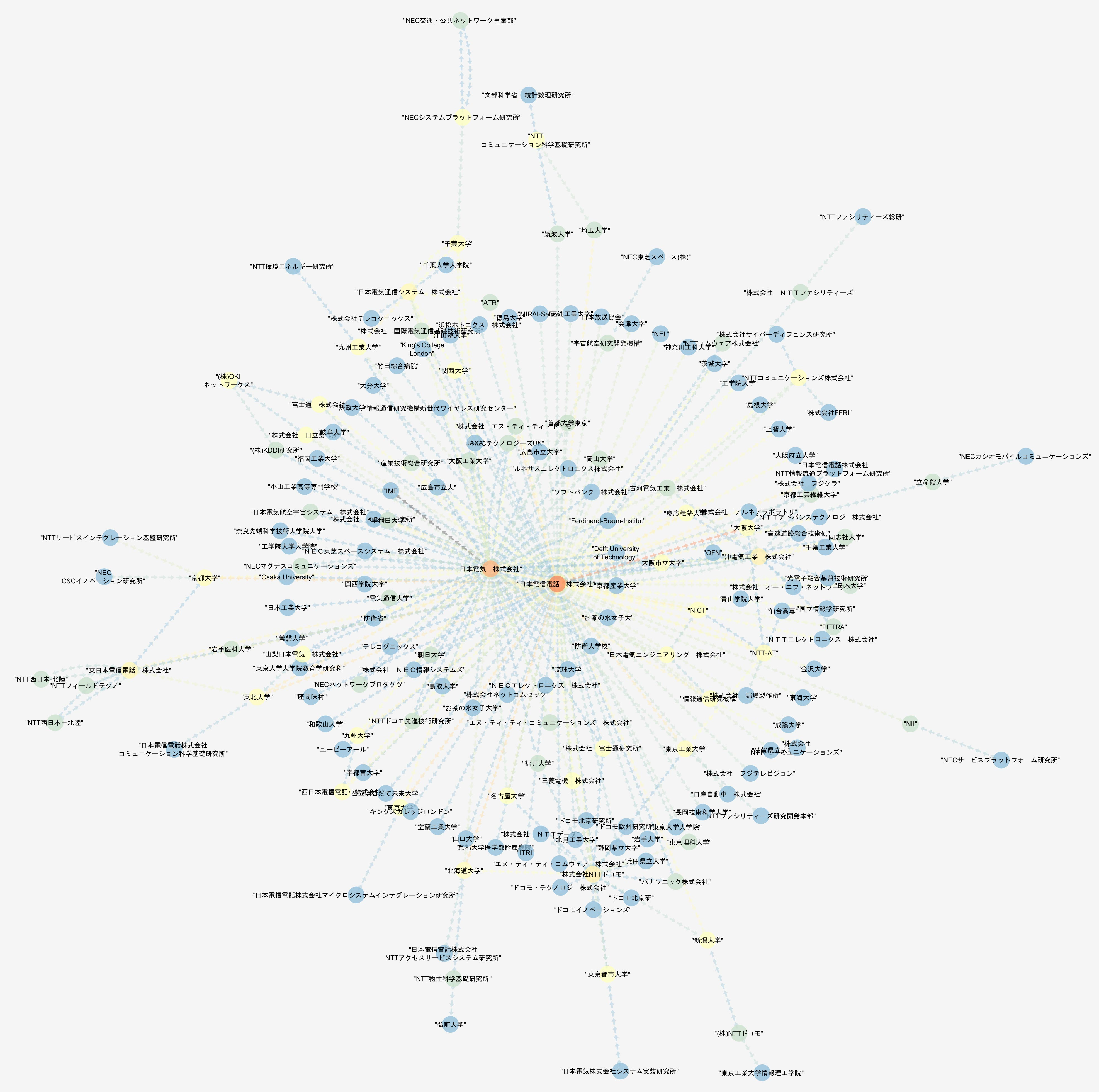 2010年以降におけるNTT、NEC、OKIを起点とした組織グラフ